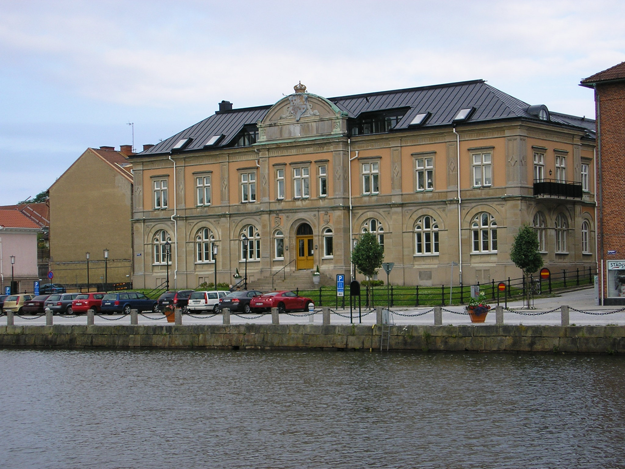 Gamla Riksbankshuset i Vänersborg.